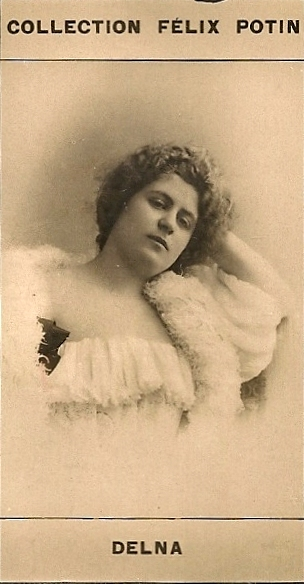 Delna